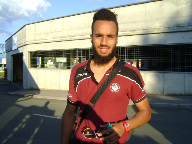 Igralec Triglava iz Kranja Lamin Diallo po zadnji tekmi sezone 2013/14 pred stadionom Portoval v NM - 25.maja 2014